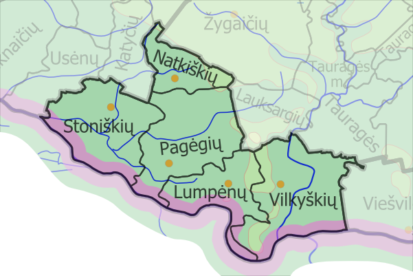 Padaryta iš :image:LietuvosSeniunijos.png